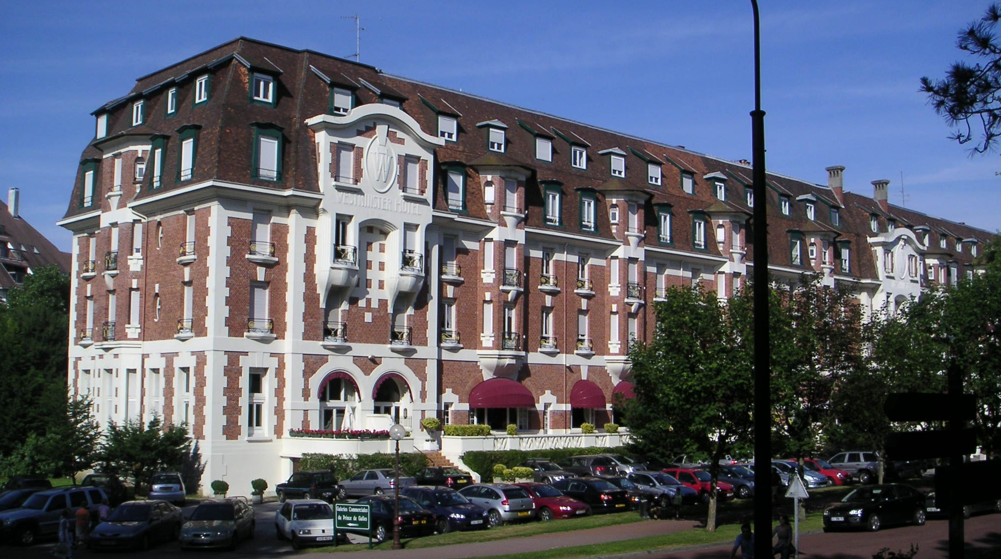 Photo prise par moi-même le 18 juillet 2006